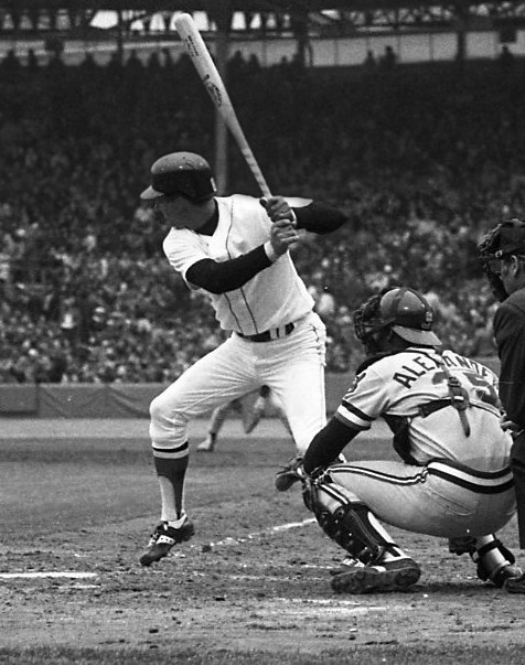 Carl Yastrzemski Boston Red Sox. 1970's